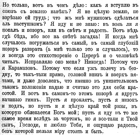 Fragment pierwszego wydania Braci Karamazow Fiodora Dostojewskiego, księga 3, rozdział 3;A paragraph from Book Three, Chapter Three of The Brothers Karamazov by Fyodor Dostoyevsky, original edition in "The Russian Messenger"